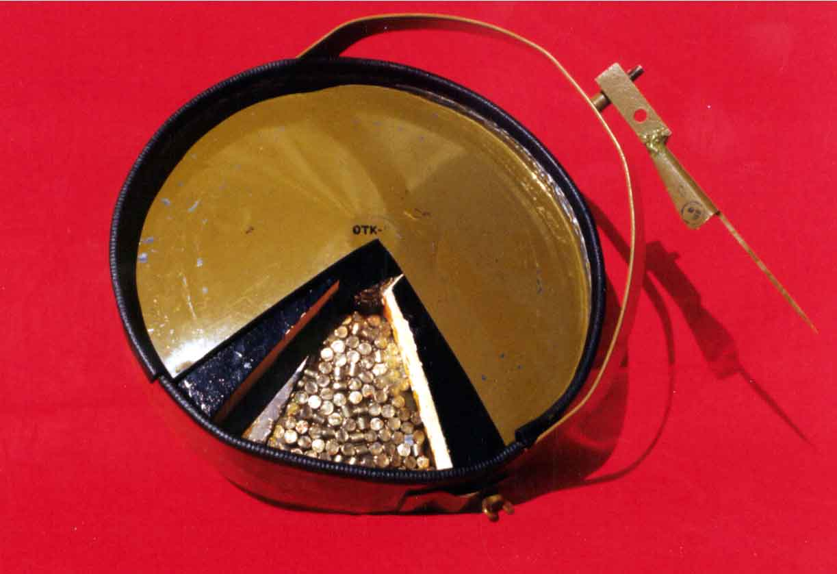 Sowiecka mina przeciwpiechotna MON-100